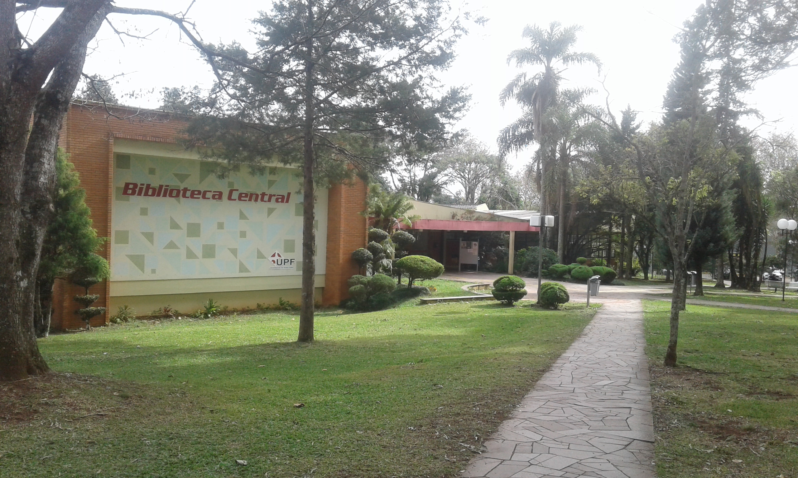 Biblioteca Central, Universidade de Passo Fundo, RS, Brasil